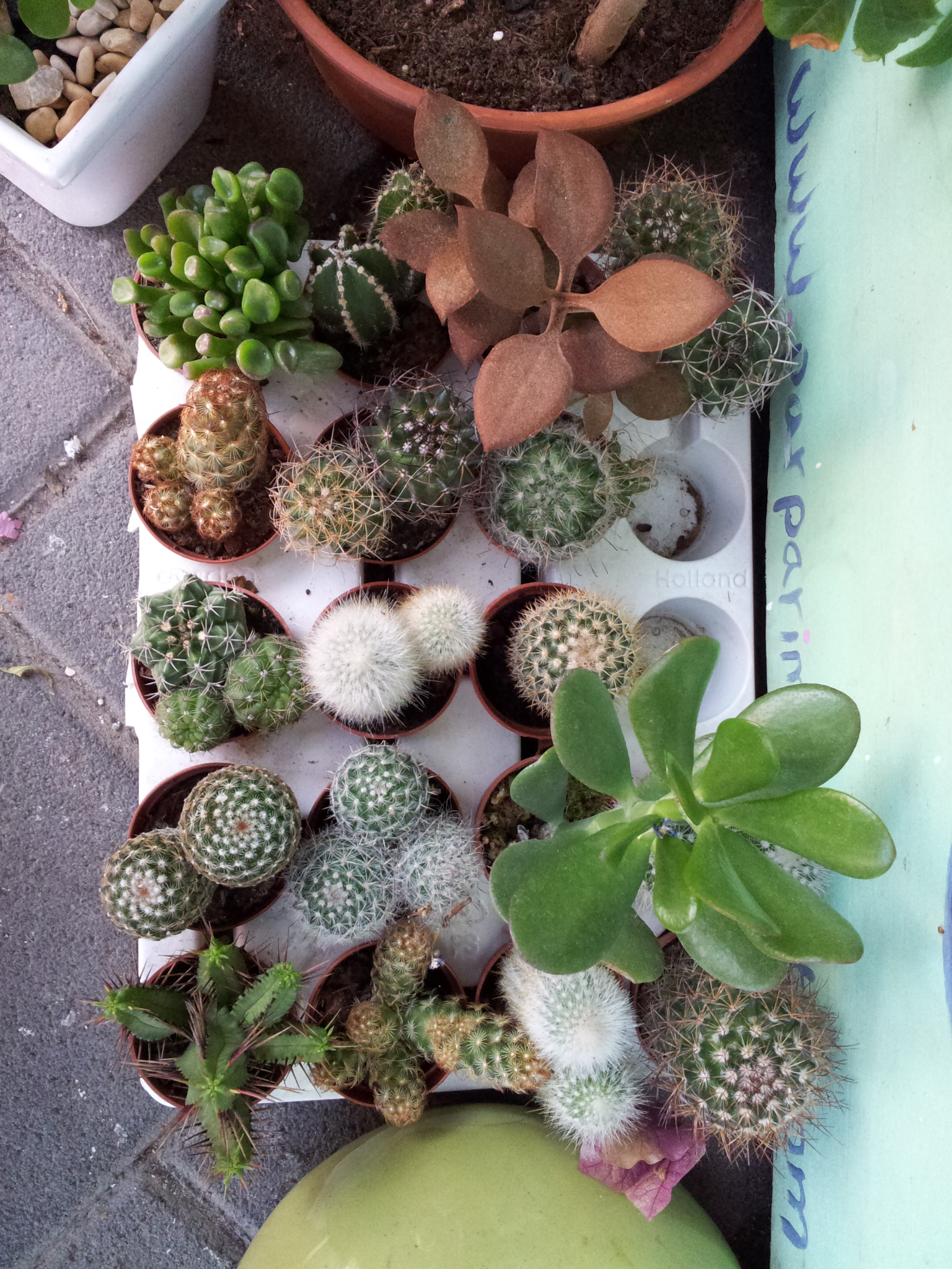 צבריים (2) בנווה צדק